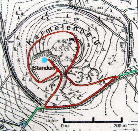 Karte des Karmelenbergs. Es handelt sich um einen bearbeiteten Ausschnitt eines Fotos einer am Karmelenberg aufgestellten Informationstafel.